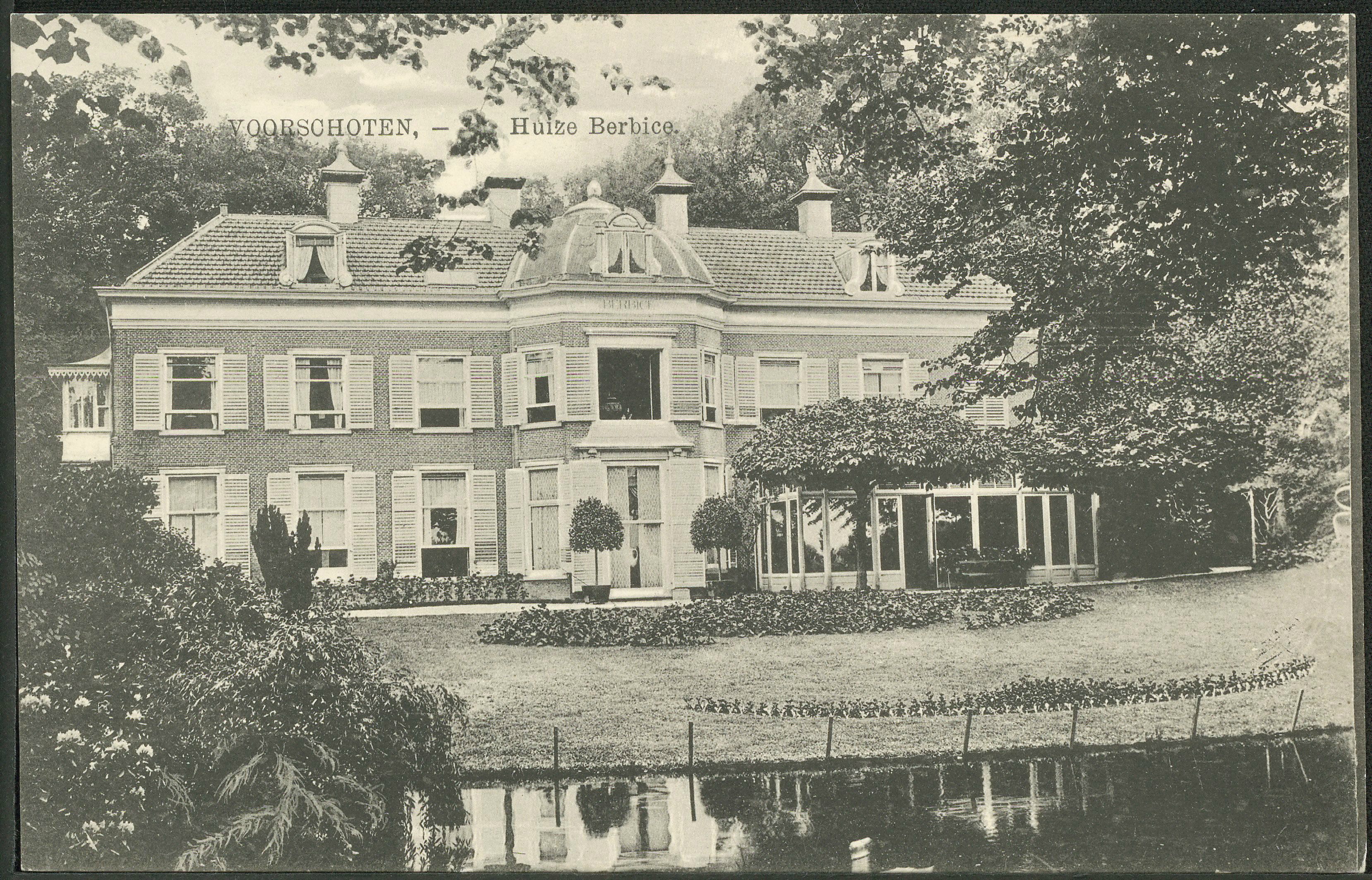 Prentbriefkaart van Huize Berbice te Voorschoten.